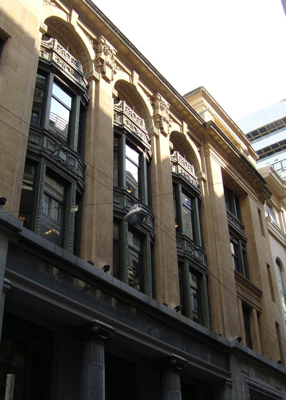 Ventanas hacia la calle Bartolomé Mitre del edificio conocido como Palacio de la Reconquista, originalmente sede del Banco Anglo Sudamericano. Buenos Aires, Argentina.